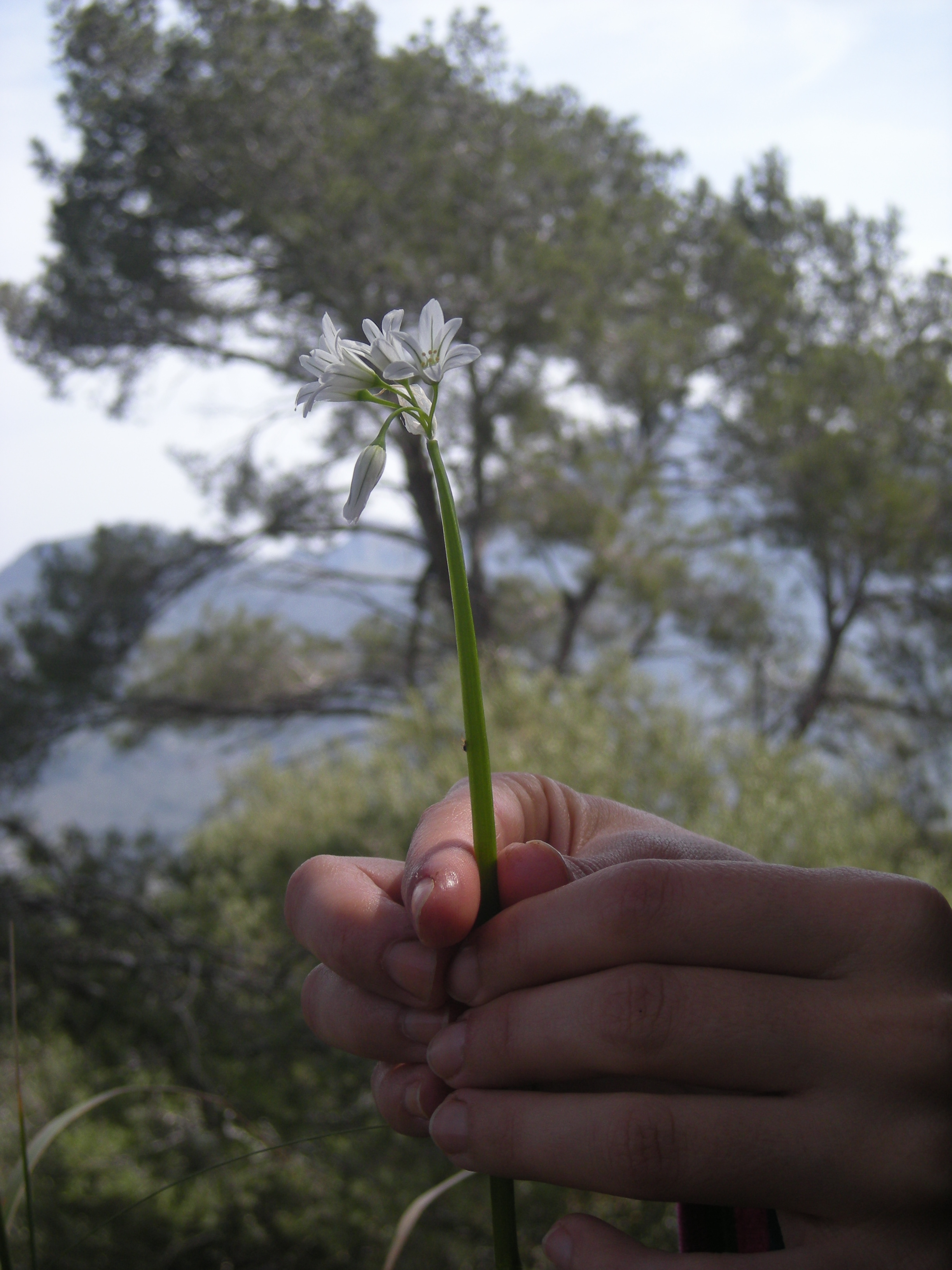 Allium Triquetrum a Sóller, Mallorca.